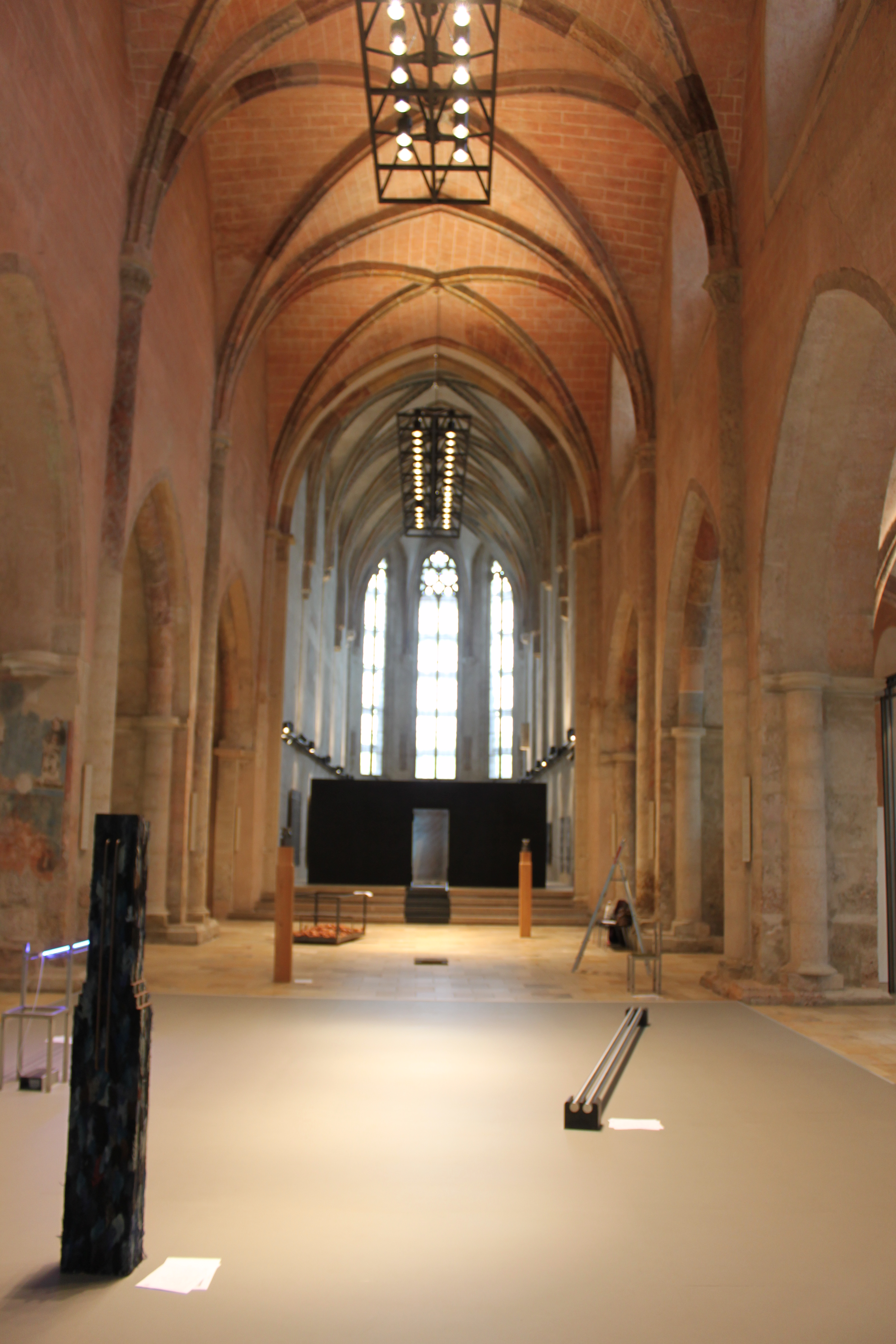 ehem. Dominikanerkirche und Kloster/Museum: Dominikanerkirche. Langhaus mit teils erkennbaren Seitenschiffen Richtung Chor, Plastiken einer Ausstellung erkennbar